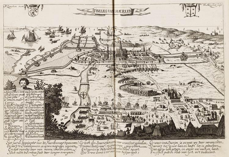 Depiction of the Siege of Haarlem, winter 1572-1573. From Samuel Ampzing, Beschreijvinge ende Lof der Stad Haerlem (Haarlem, 1628).